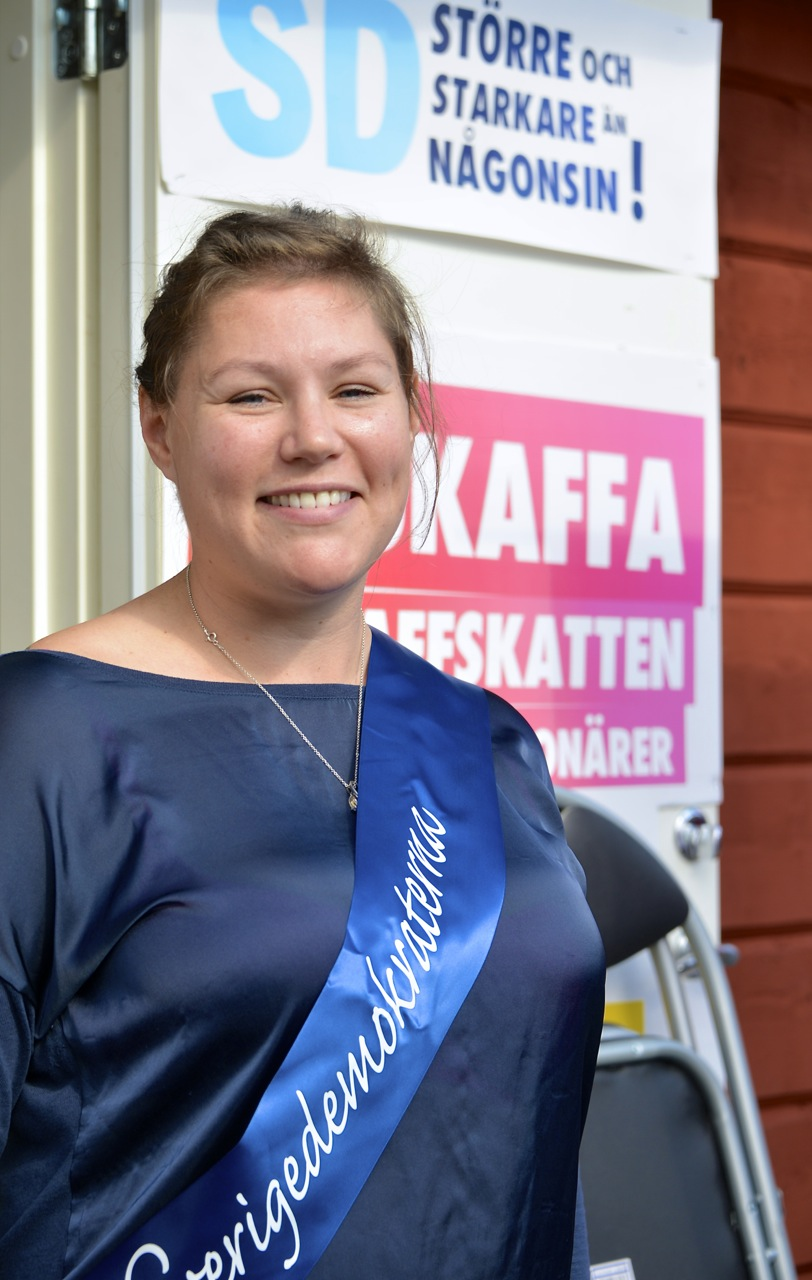 Maria Danielsson i Sverigedemokraternas valstuga på Sergels torg i Stockholm den 10 september 2014.